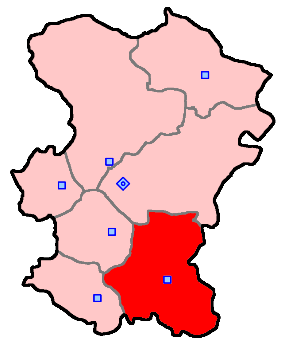 حوزهٔ انتخاباتی ملایر برای انتخابات مجلس شورای اسلامی